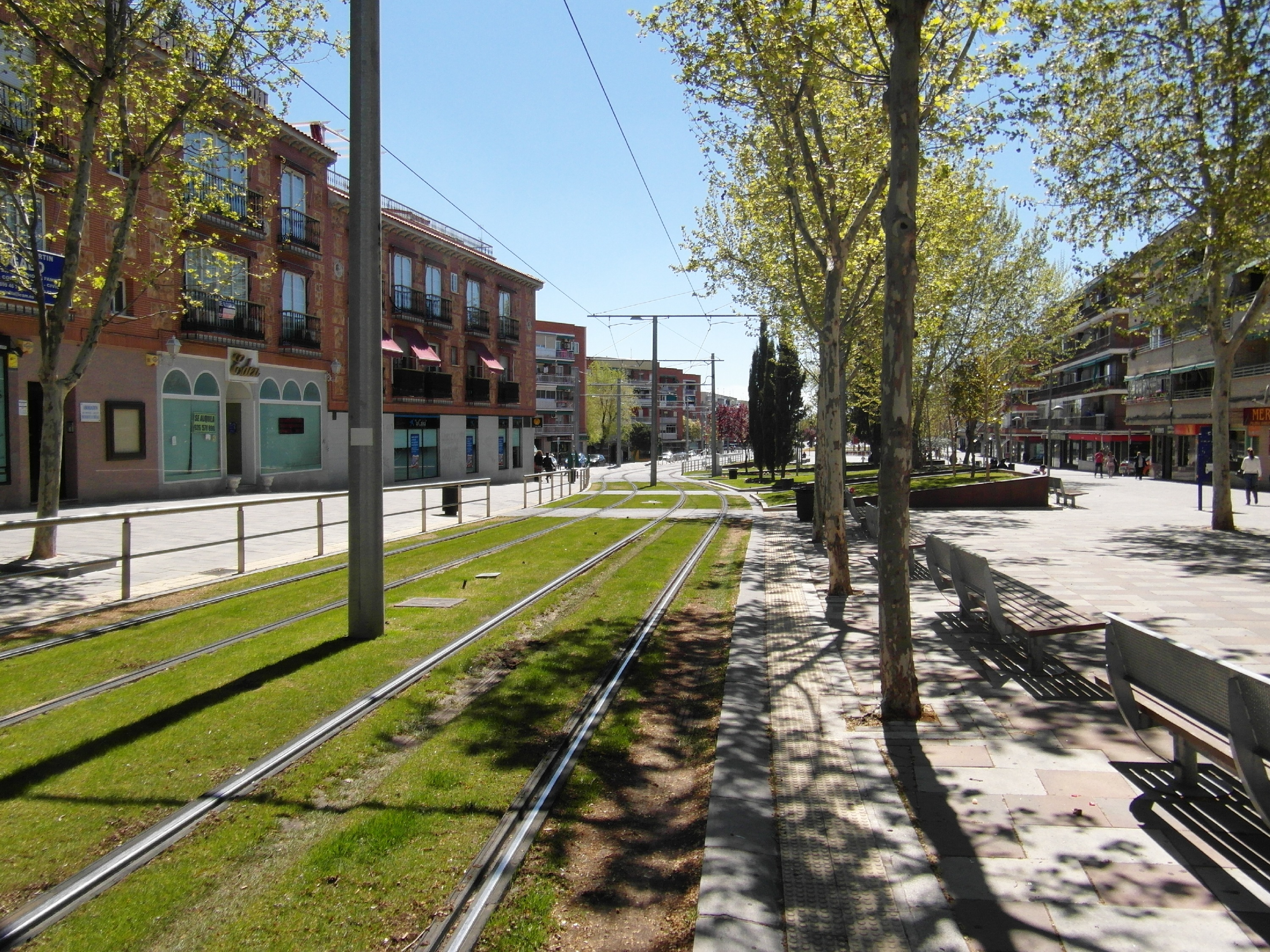 Tranvía de Parla